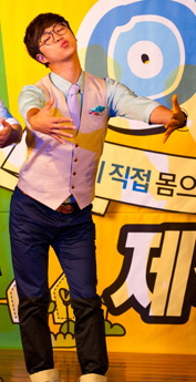 안아줘 제작발표회